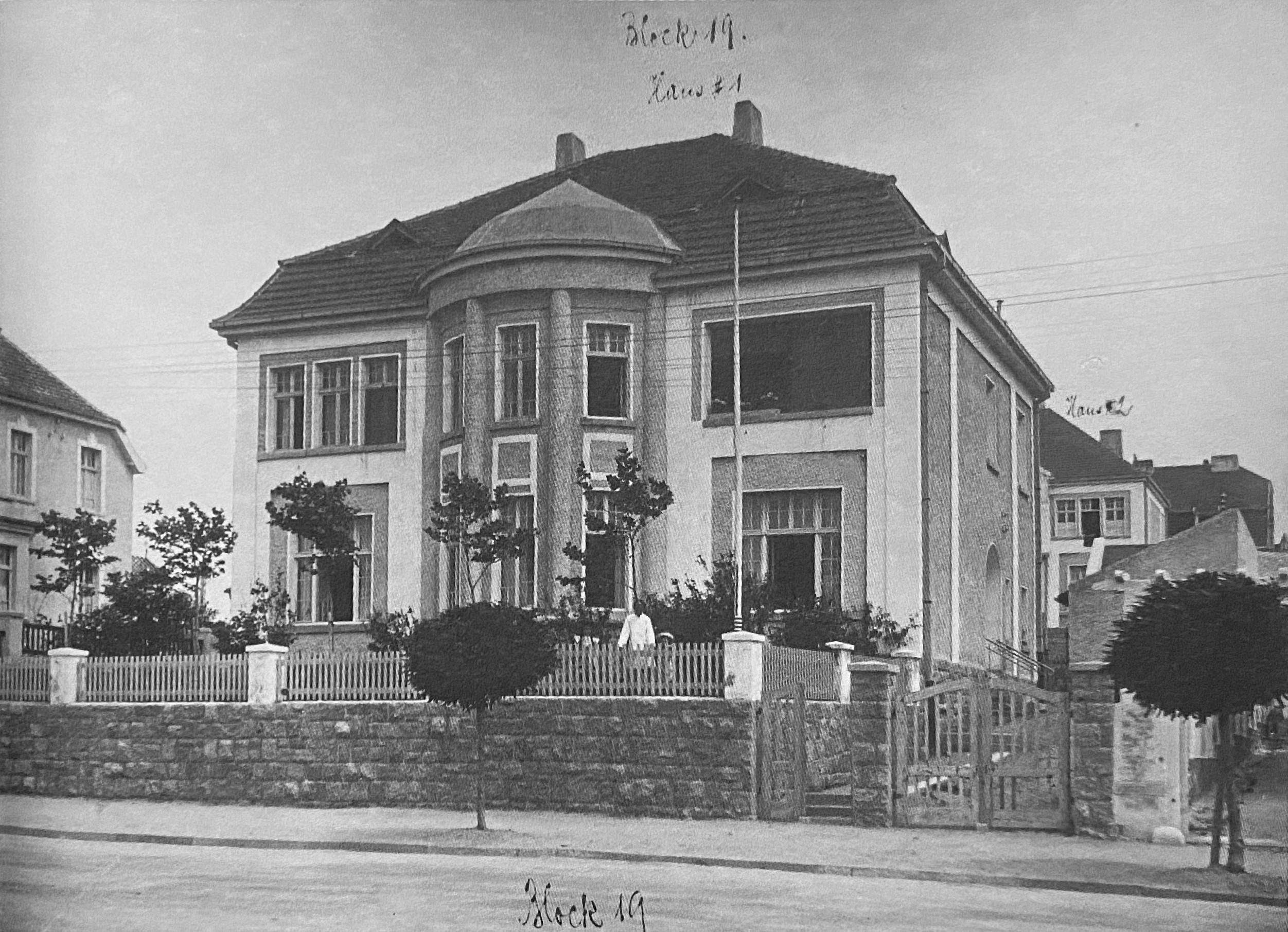 青岛海因里希亲王大街21街区（原B街区）I号楼